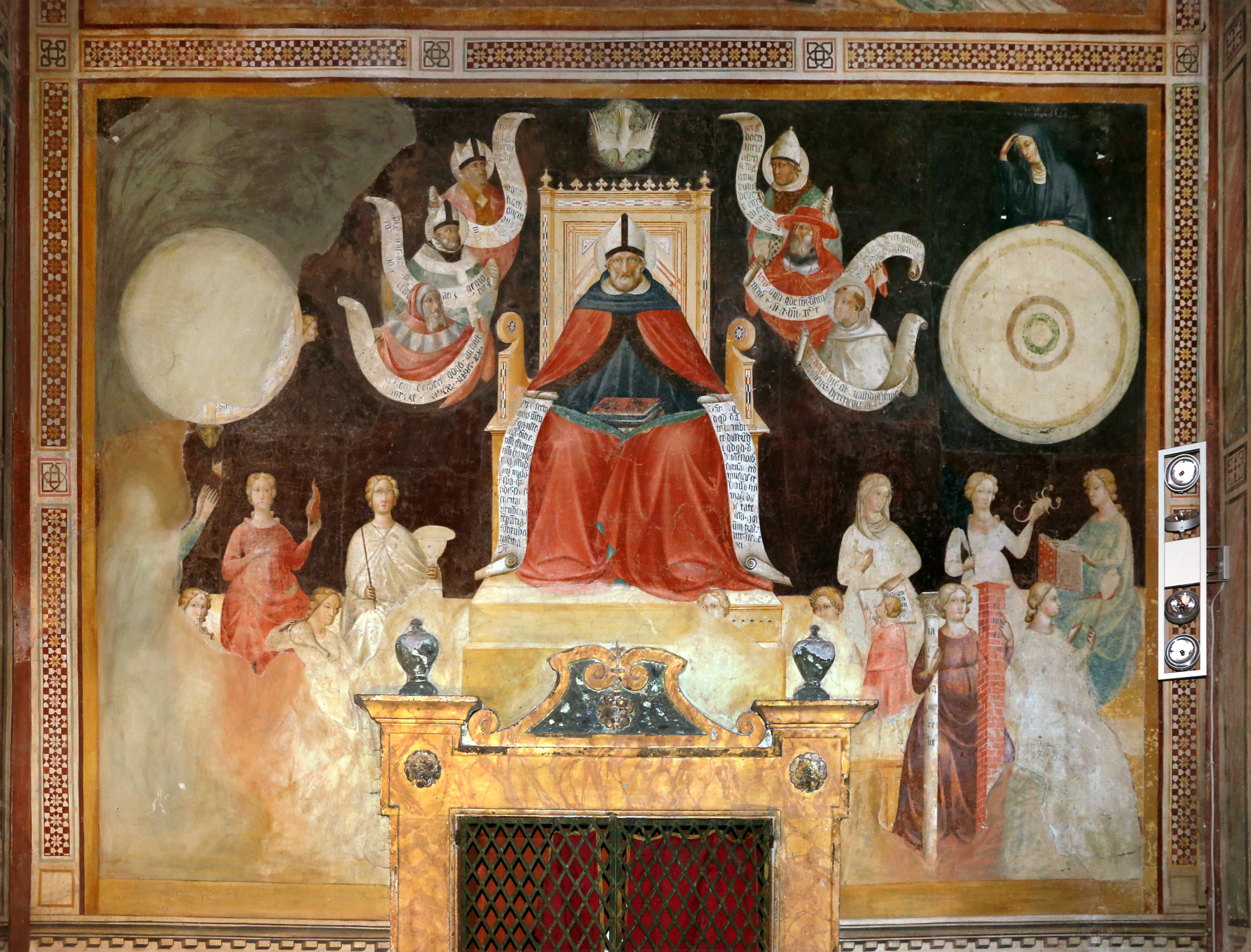 chiesa di San Francesco This is a photo of a monument which is part of cultural heritage of Italy.